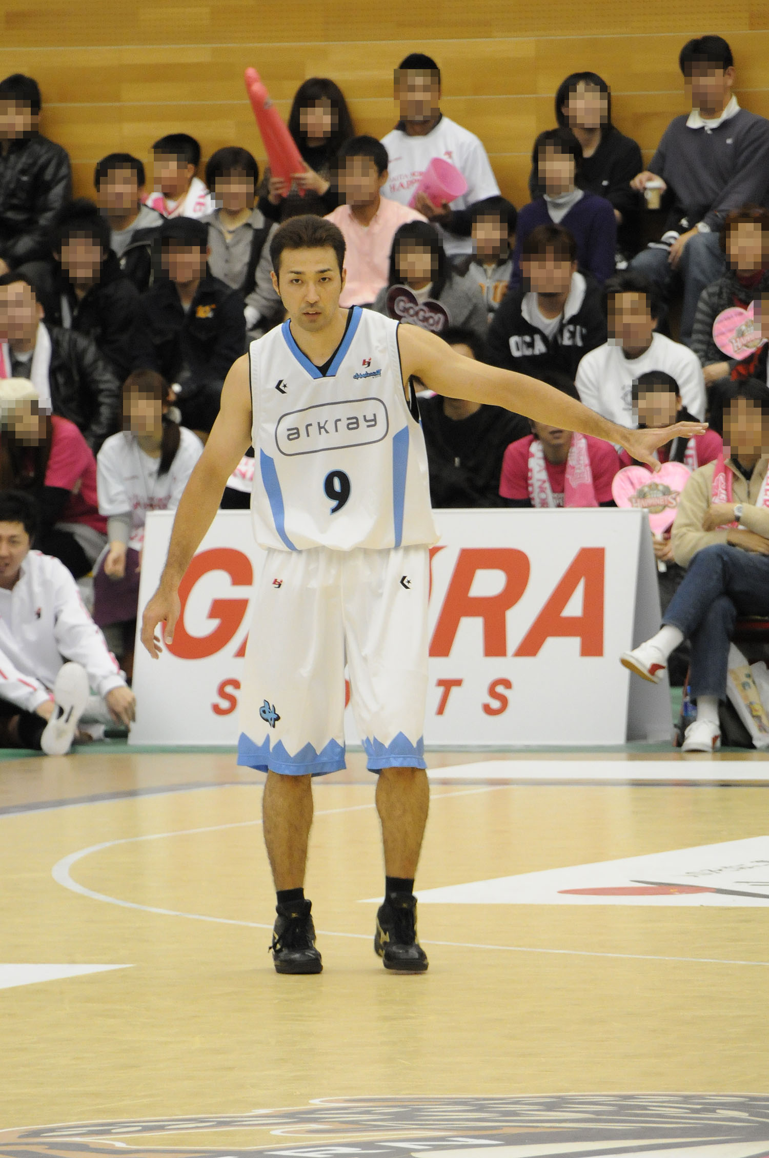 京都ハンナリーズの仲村直人選手。能代市総合体育館で。